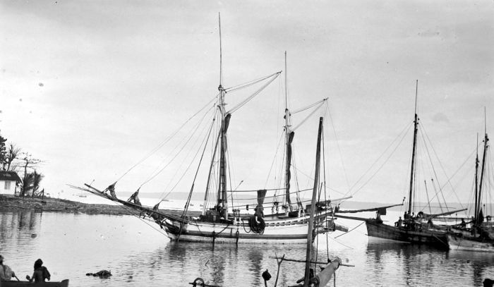 Negatief. Een Boeginese prauw aan de kust van West-Celebes